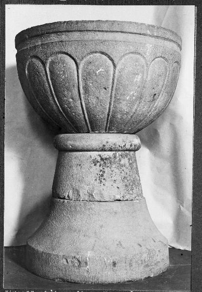 Dopfunt, medeltida. Kategori: (04) DopfuntarDopfunt, medeltida.